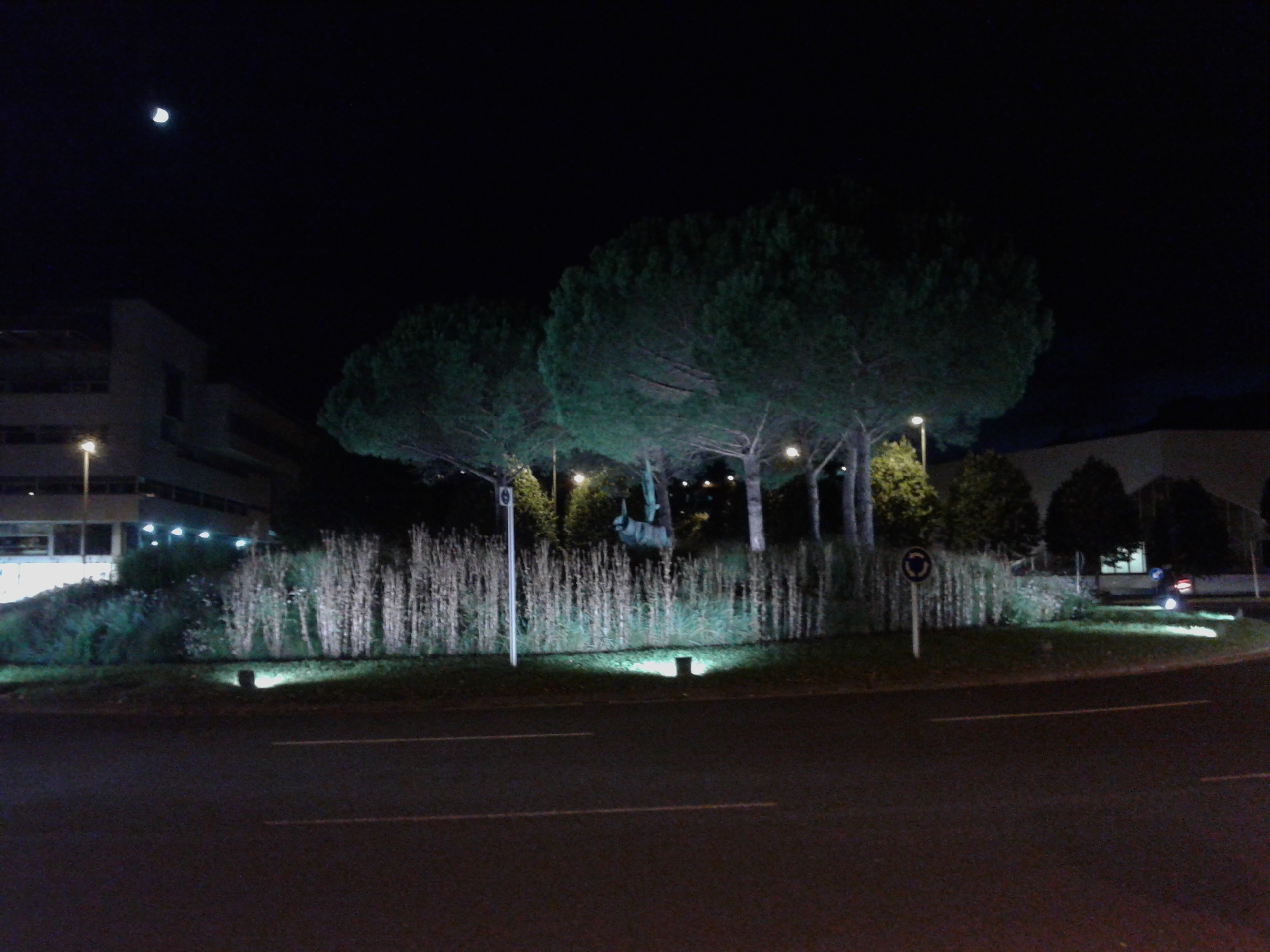 Europa plazaren erdiko eskultura.